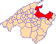 Badia d'Alcúdia